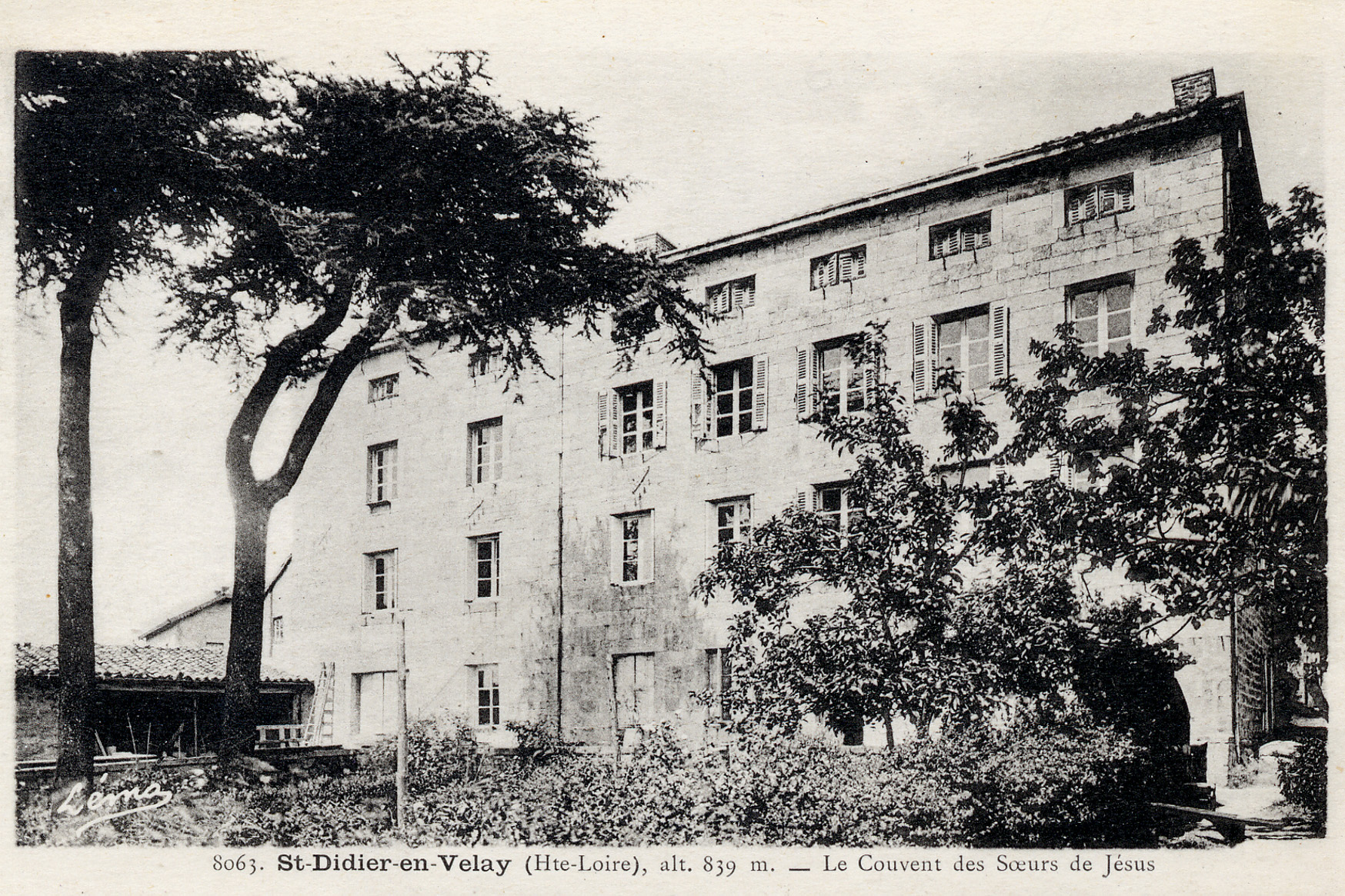 L'ancien couvent des Soeurs de Jésus, devenu l'actuelle résidence Claire-Joie